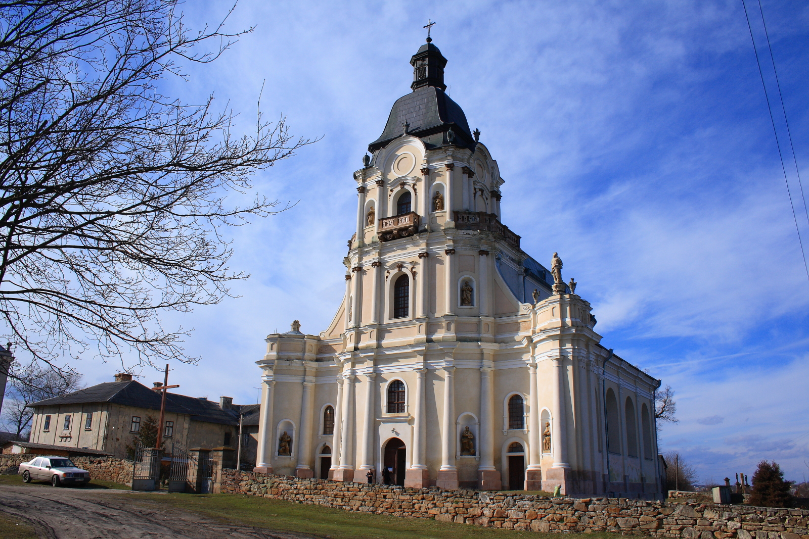 Микулинці